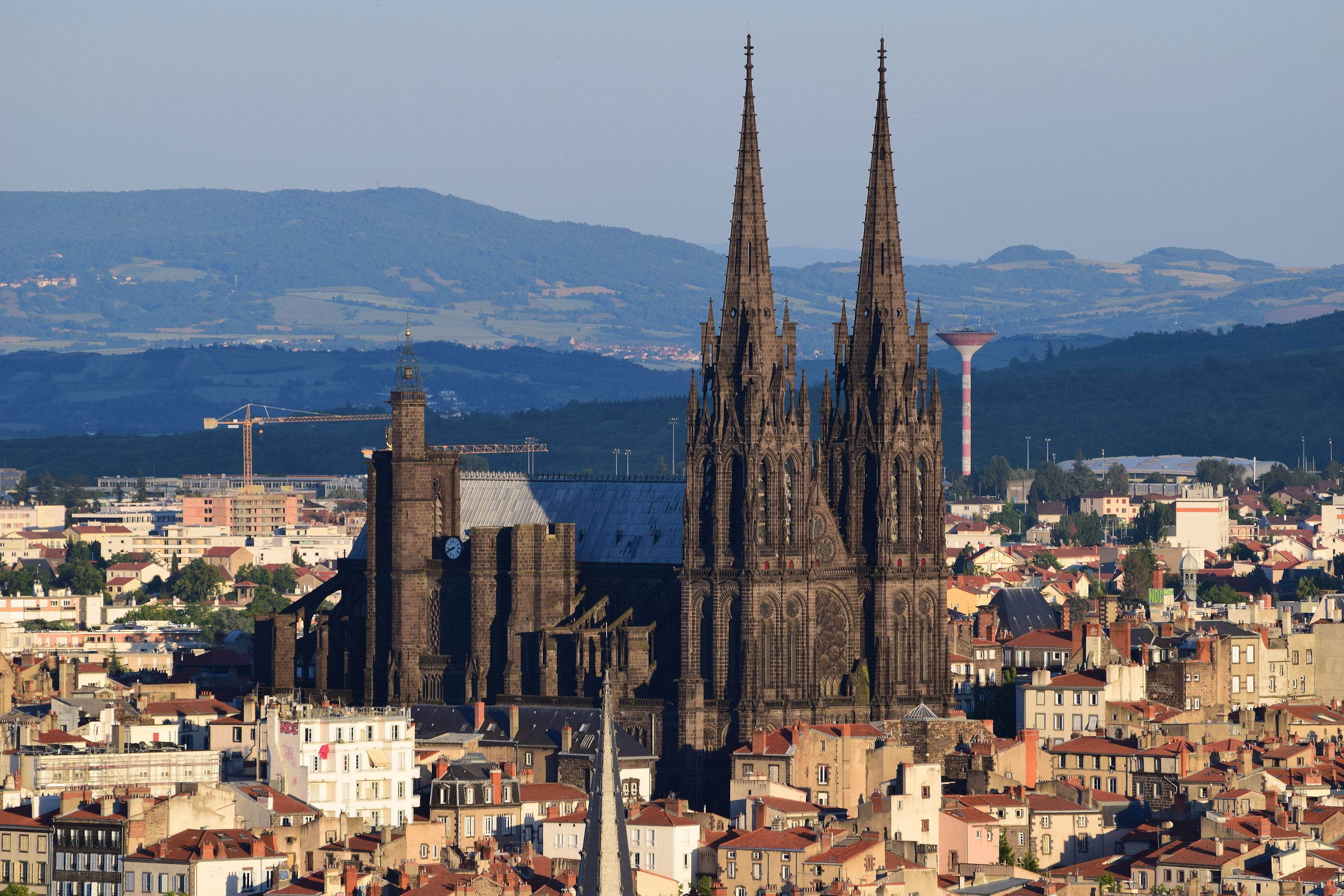 Cathédrale Notre-Dame de l'Assomption de Clermont-Ferrand vue de Montjuzet